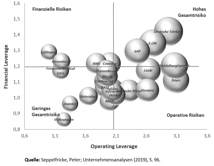 Die Abbildung habe ich eigenständig mit Powerpoint angefertigt. Die Daten befinden sich in der angegebenen Quelle. Es bestehen keine Urheberkonflikte.